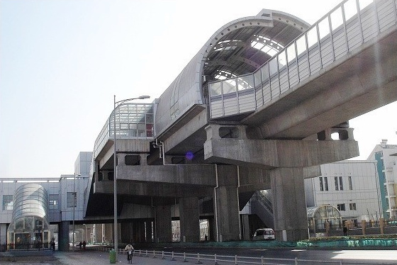 中文（中国大陆）: 华山里站（地铁一号线）